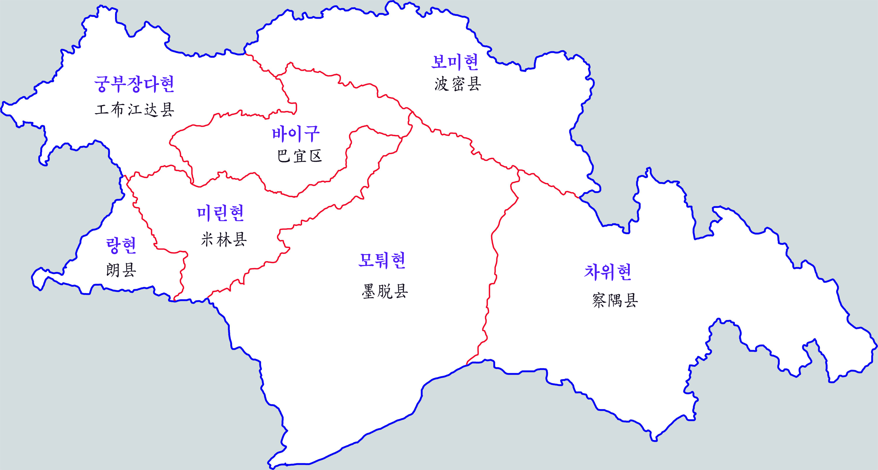 린즈시 행정구역